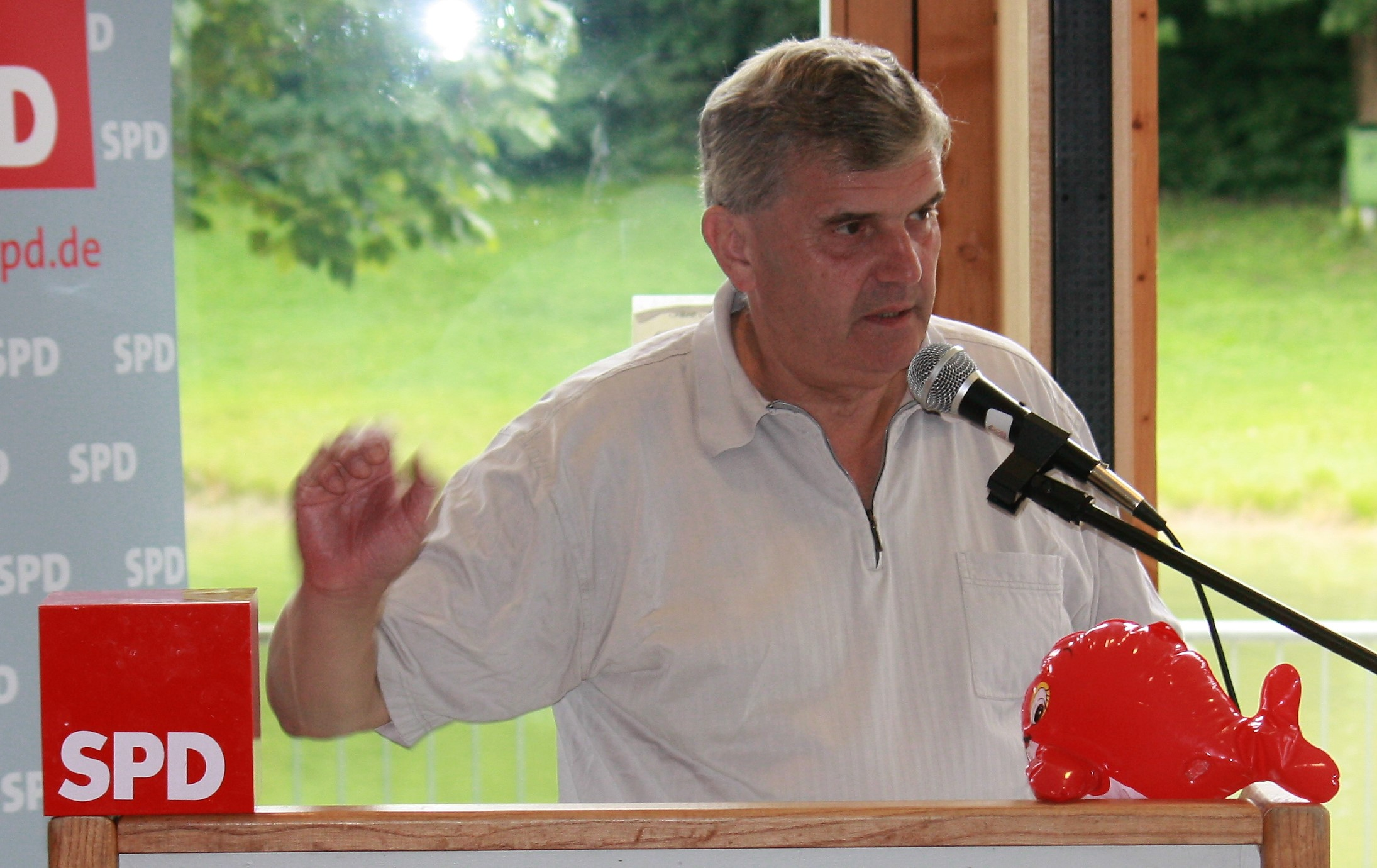 Ewald Schurer bei einer Wahlkampfveranstaltung in Markt Schwaben.